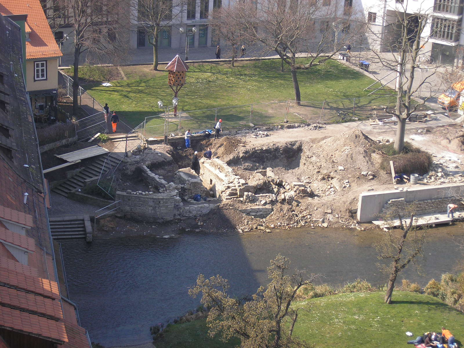 Ausgrabungsstätte der mittelalterlichen Mikwe in Erfurt, vom Turm der Ägidienkirche aus gesehen.